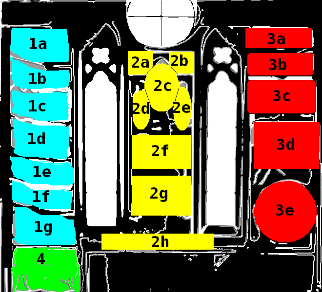 Schema degli affreschi della parete frontale della chiesa di Napoli Santa Maria Donnaregina Vecchia 1. Paradiso a) Angeli b) Patriarchi c) Apostoli d) Beati del Vecchio Testamento e) Santi del Nuovo Testamento f) Sante del Nuovo Testamento g) Corteo degli eletti 2. Giudizio Universale a) Cherubino b) Abramo, Isacco e Giacobbe c) Cristo d) Madonna e) San Giovanni Battista f) Esaltazione della Croce g) Resurrezione della carne h) Santi e Sante 3. Inferno a) Angeli b) Patriarchi c) Apostoli d) Dannati e) Inferno 4. Martirio di Sant'Orsola